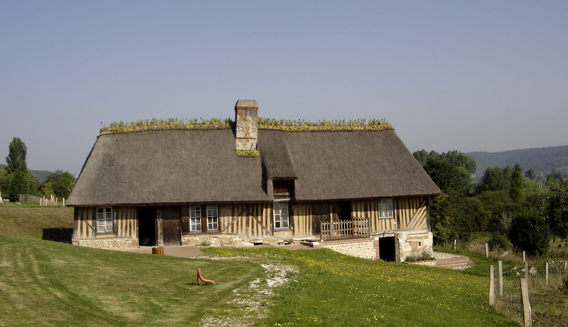 Chaumière à Saint-Sulpice-de-Grimbouville (Eure, Normandie, France)